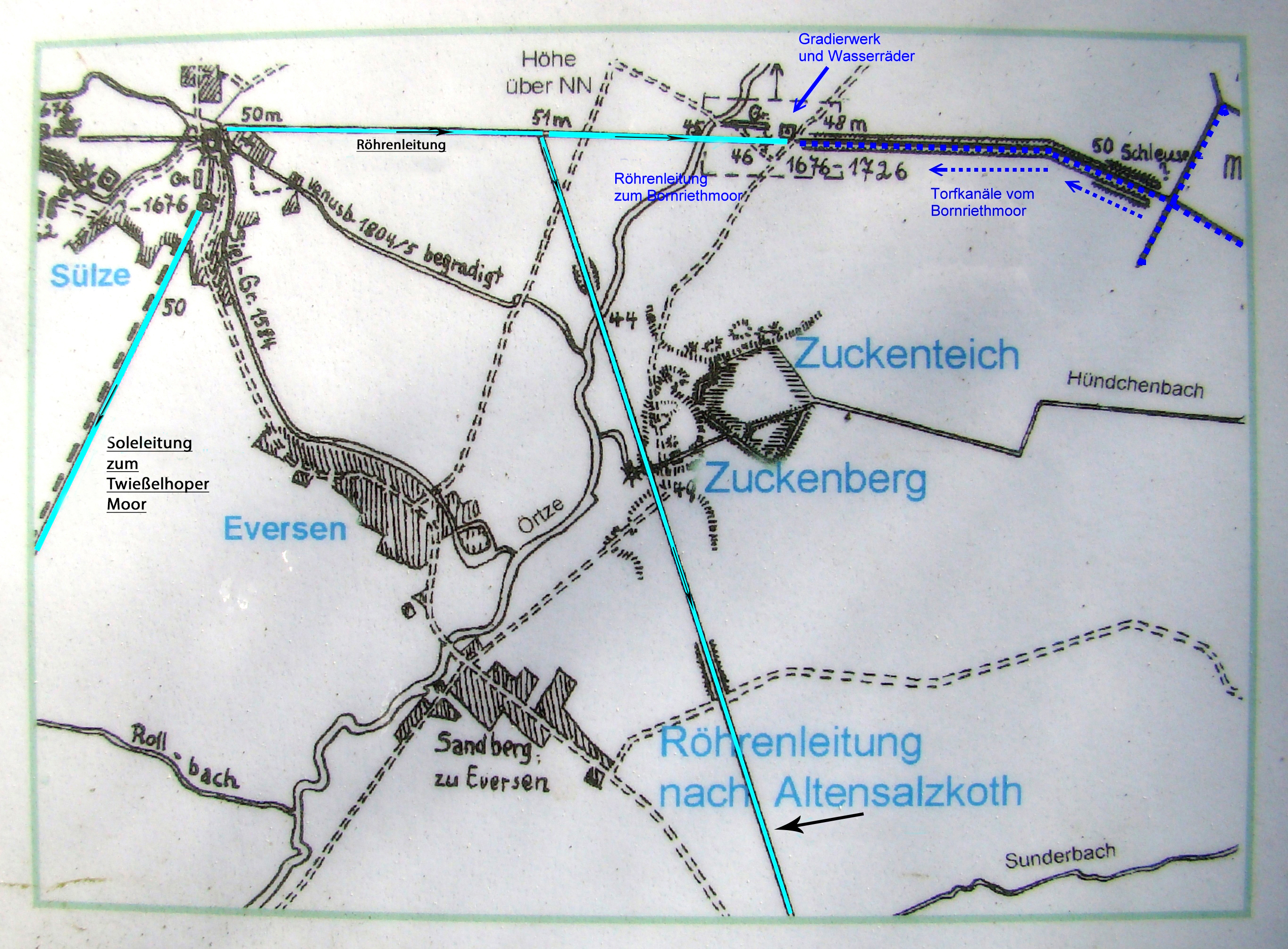 Bild aus der öffentlich aufgestellten Infotafel: Röhrenleitung der Salzsole von Sülze nach Altensalzkoth